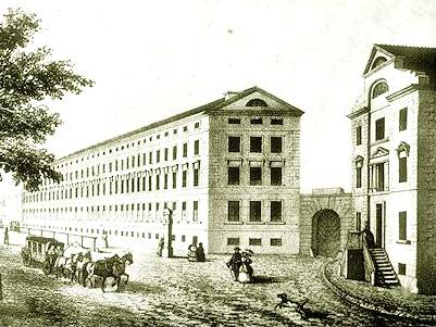 Kalisz, pl. Kilińskiego 2 - fabryka sukna Beniamina Repphana (dawniej zabudowania klasztoru bernardynek z lat 1816-20)